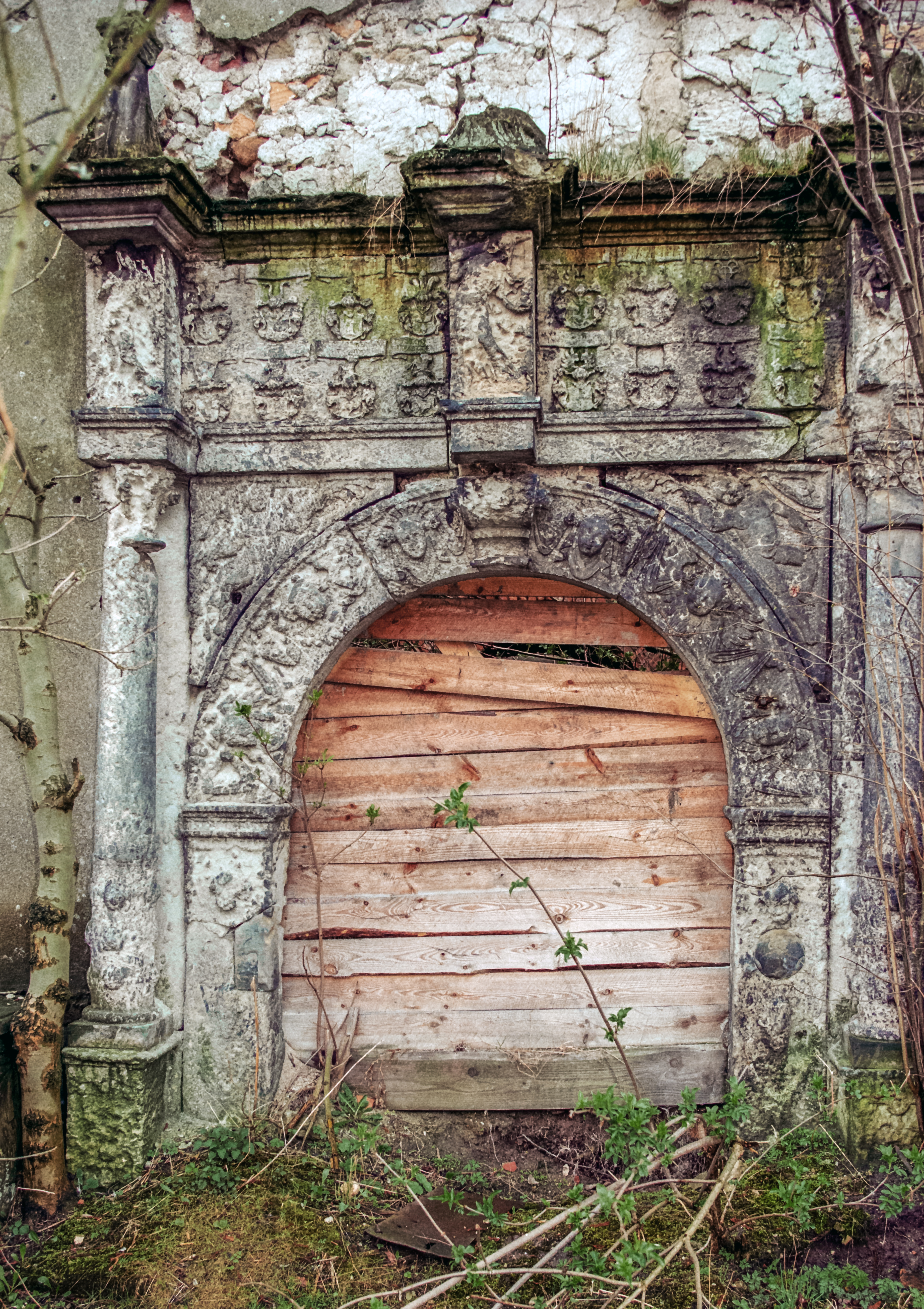 Ruiny pałacu w Gościszowie, brama